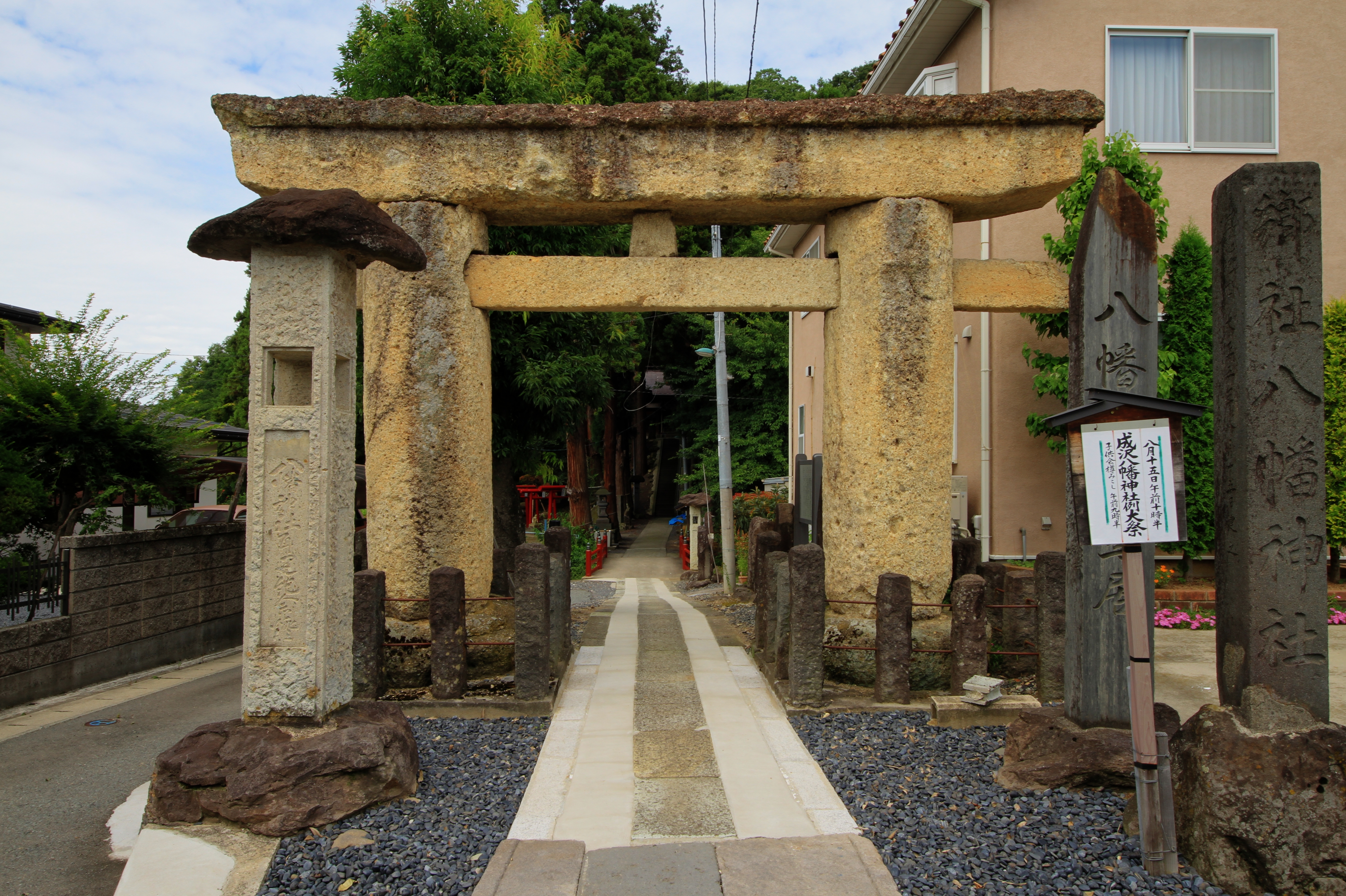 Zaonarisawa, Yamagata, Yamagata Prefecture 990-2334, Japan